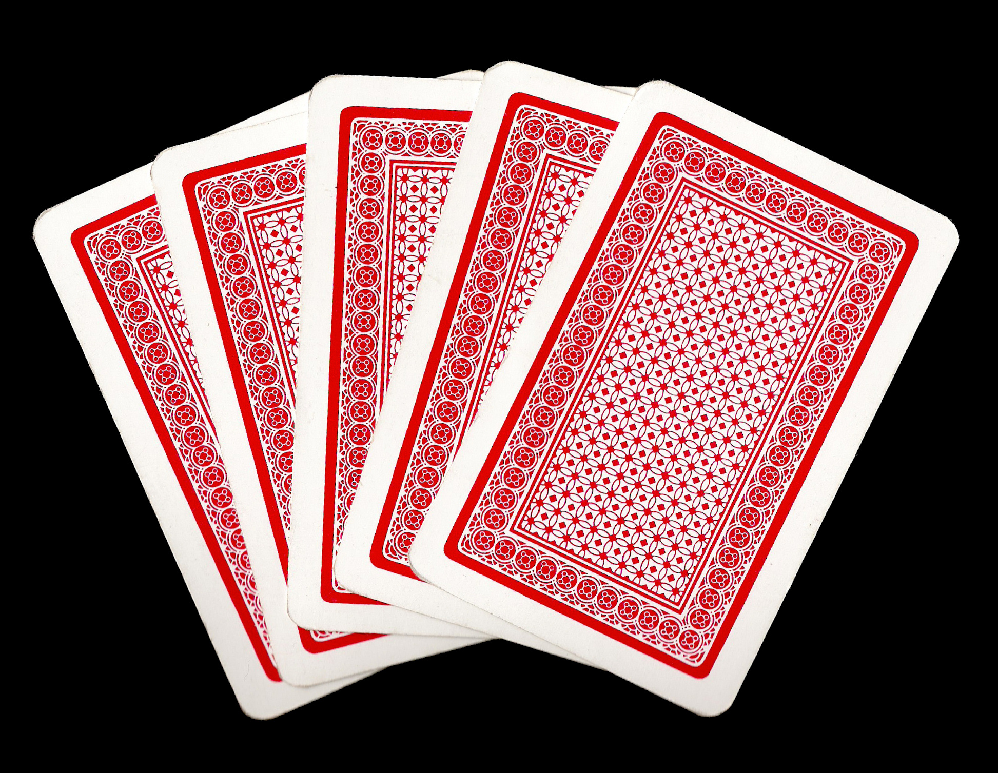 Fünf verdeckte Karten, z.B. beim Five Card Draw-Poker